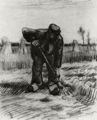 Grabender